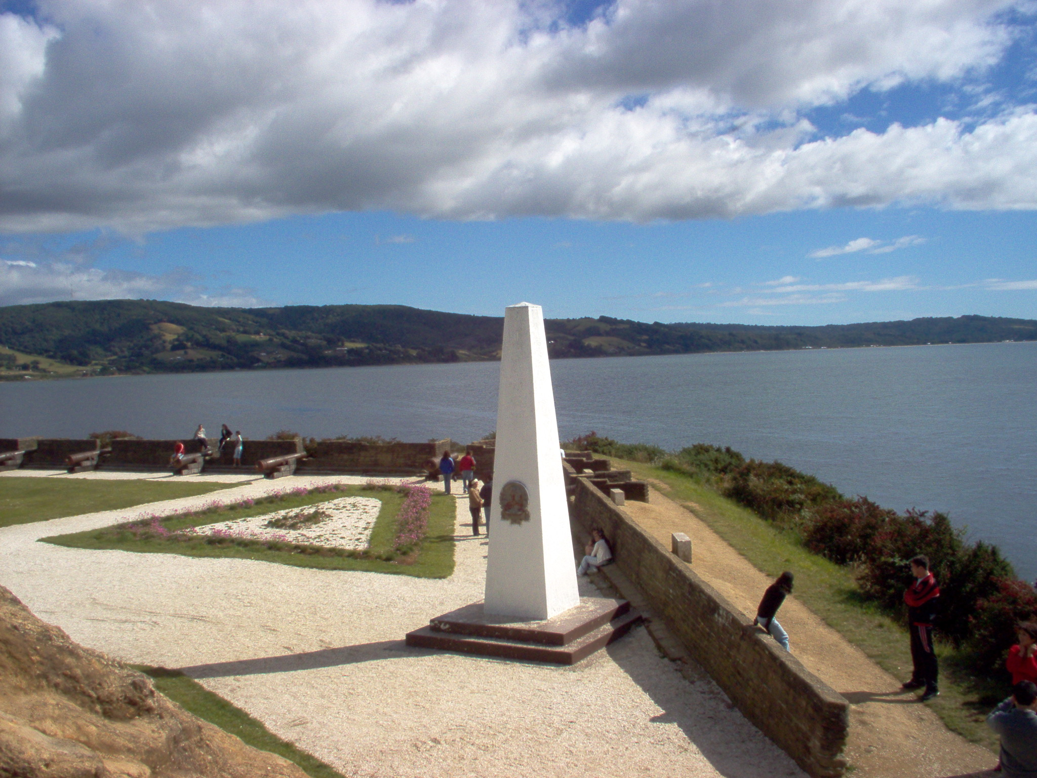 Fuerte San Antonio en Ancud, Chiloé, Chile